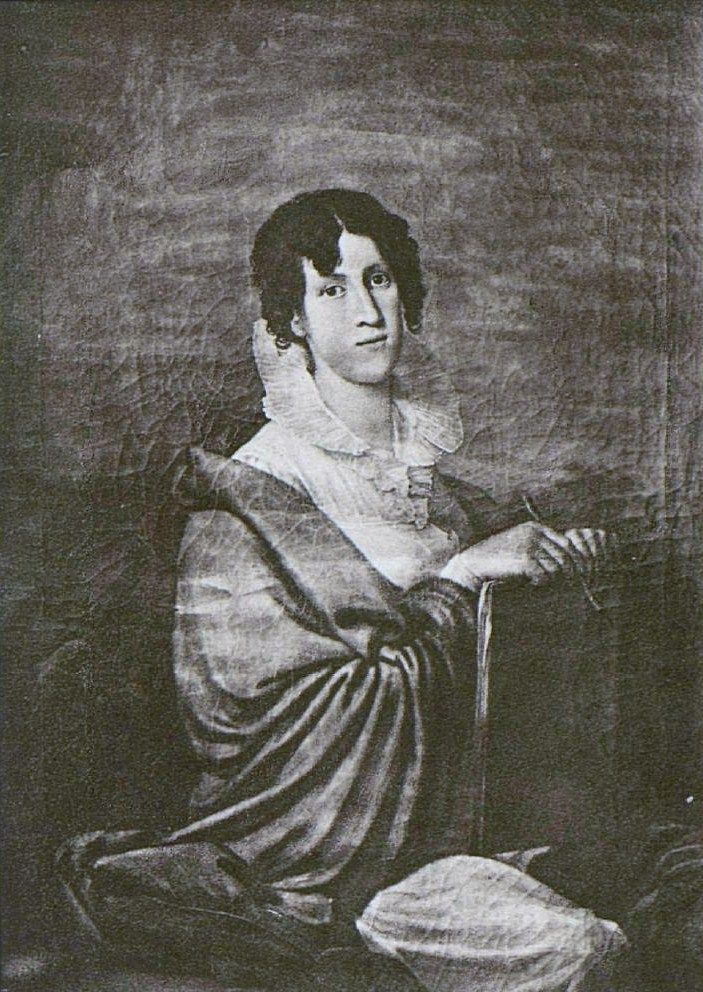 Прасковья Николаевна Фредро (1790 — после 1868) — дочь графа Николая Николаевича Головина (1756–1821) и графини Варвары Николаевны Головиной (урожденной княжны Голицыной; 1766–1821); жена графа Федро.